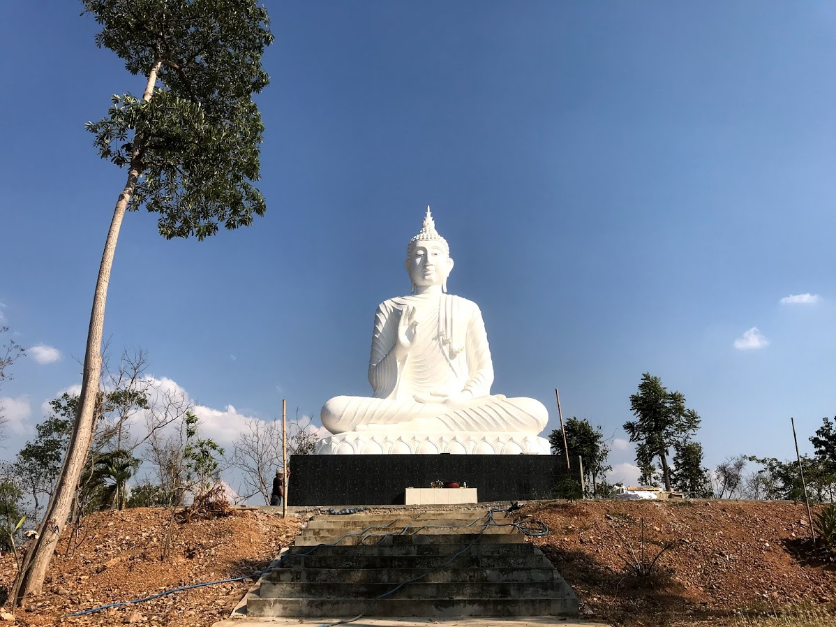 Wat Den Kra Tai Uttaradit 2020 01